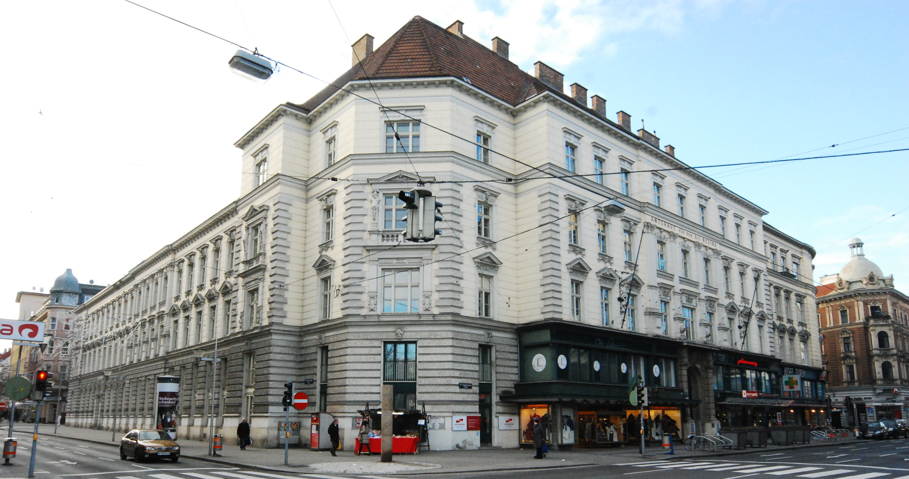 Haus Schönbrunner Straße 259 # Meidlinger Hauptstraße in Wien-Meidling - Meidlinger Amtshaus